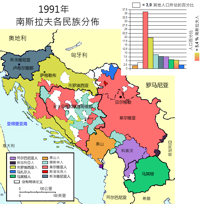 南斯拉夫民族分佈圖（簡體中文版）